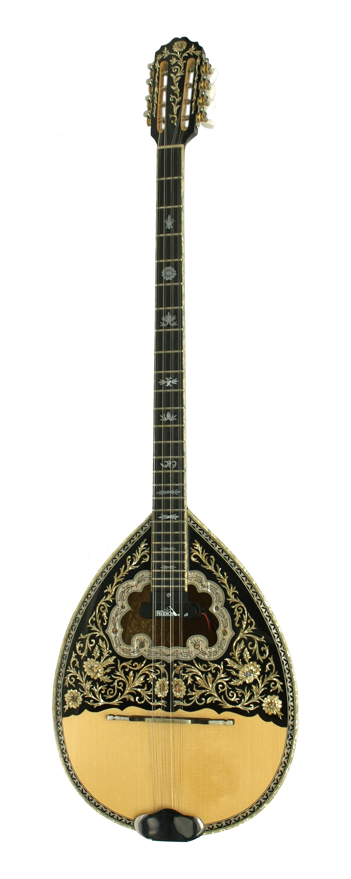 bouzouki